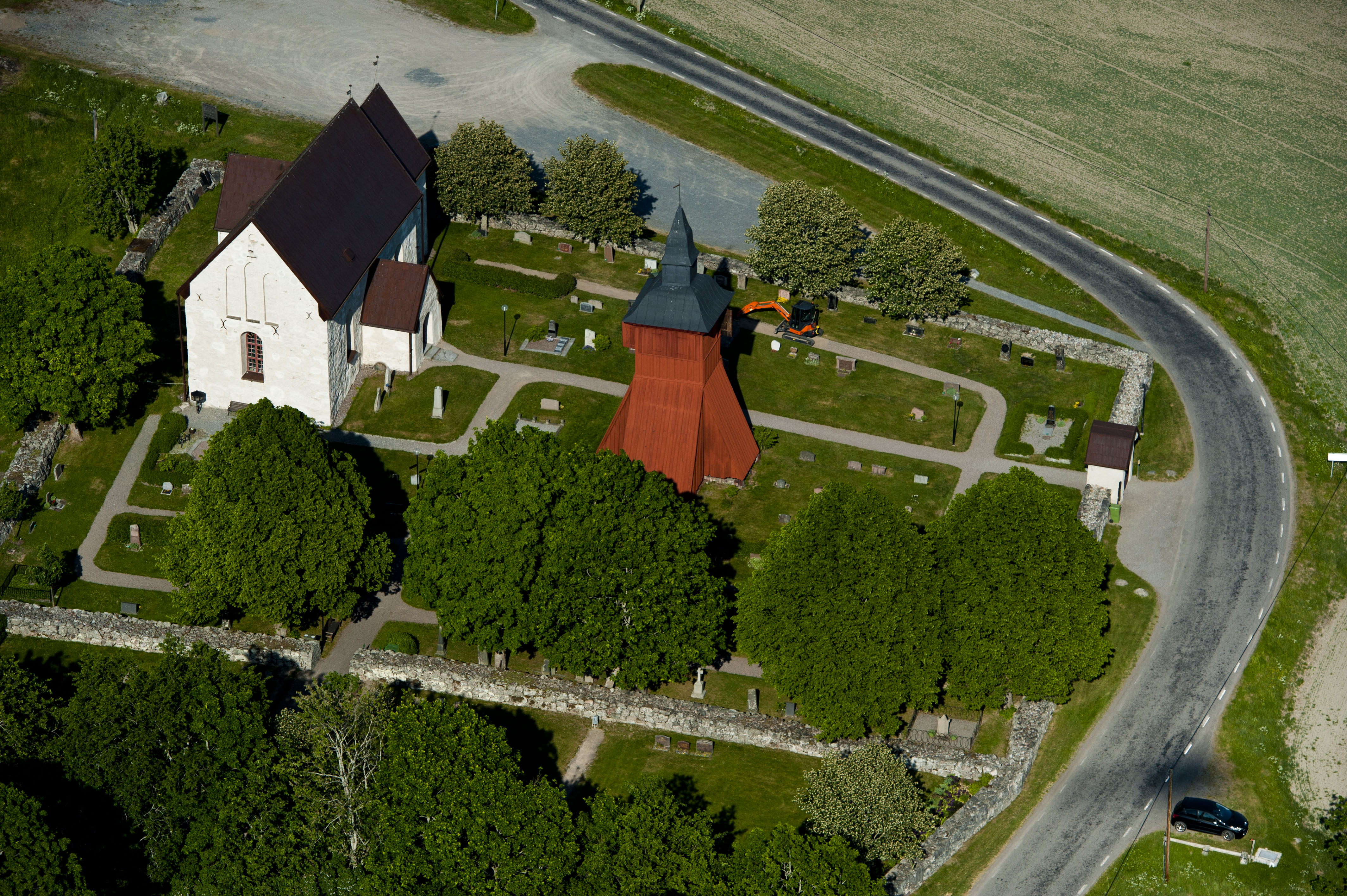 Orkesta ka